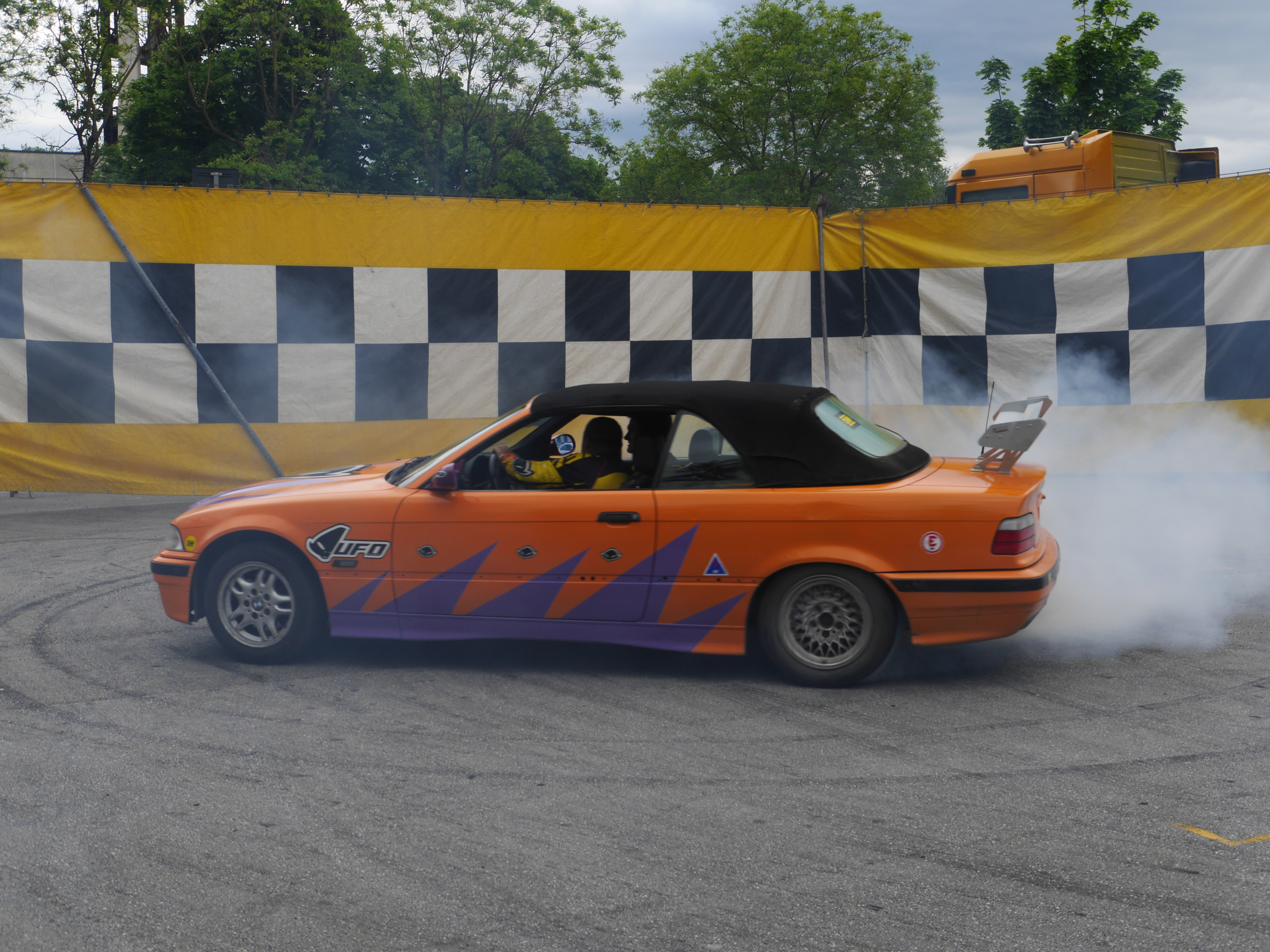 This photo was taken with Panasonic Lumix DMC-GH3 camera, thanks to Panasonic. You can see all photographs in category: Taken with Panasonic Lumix DMC-GH3.